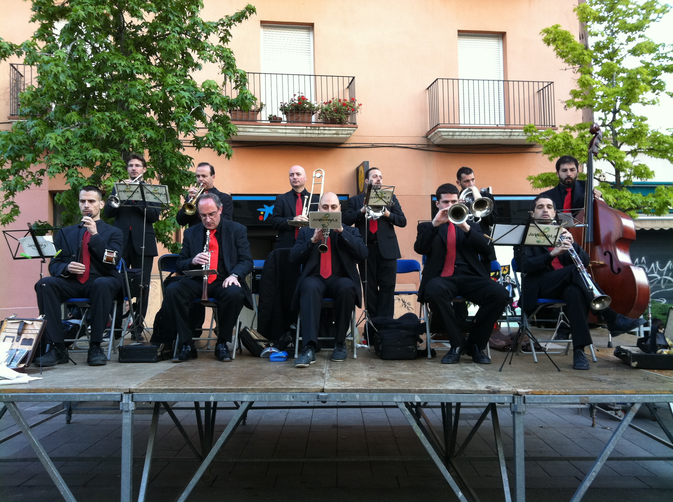 Cobla Jovenívola de Sabadell (Vallès Occidental). See also category: Diada de Sant Jordi 2011.